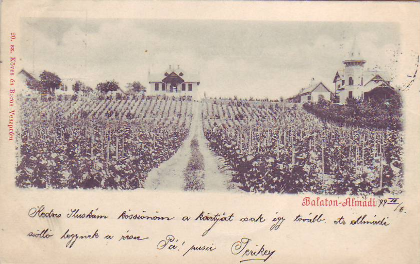 Balatonalmadi (Hungary) in about 1900